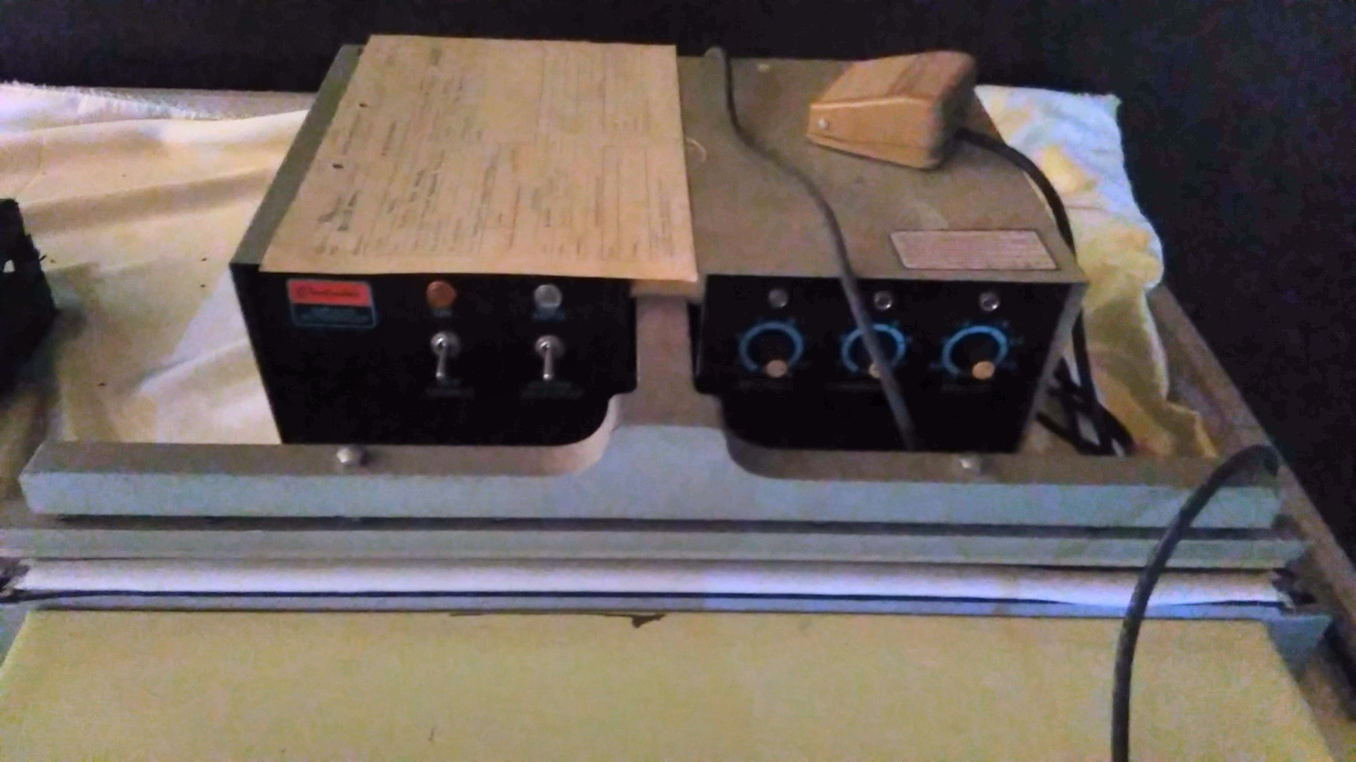 Mesin Laminate Kertas (Plastic Bag Sealer) 1991